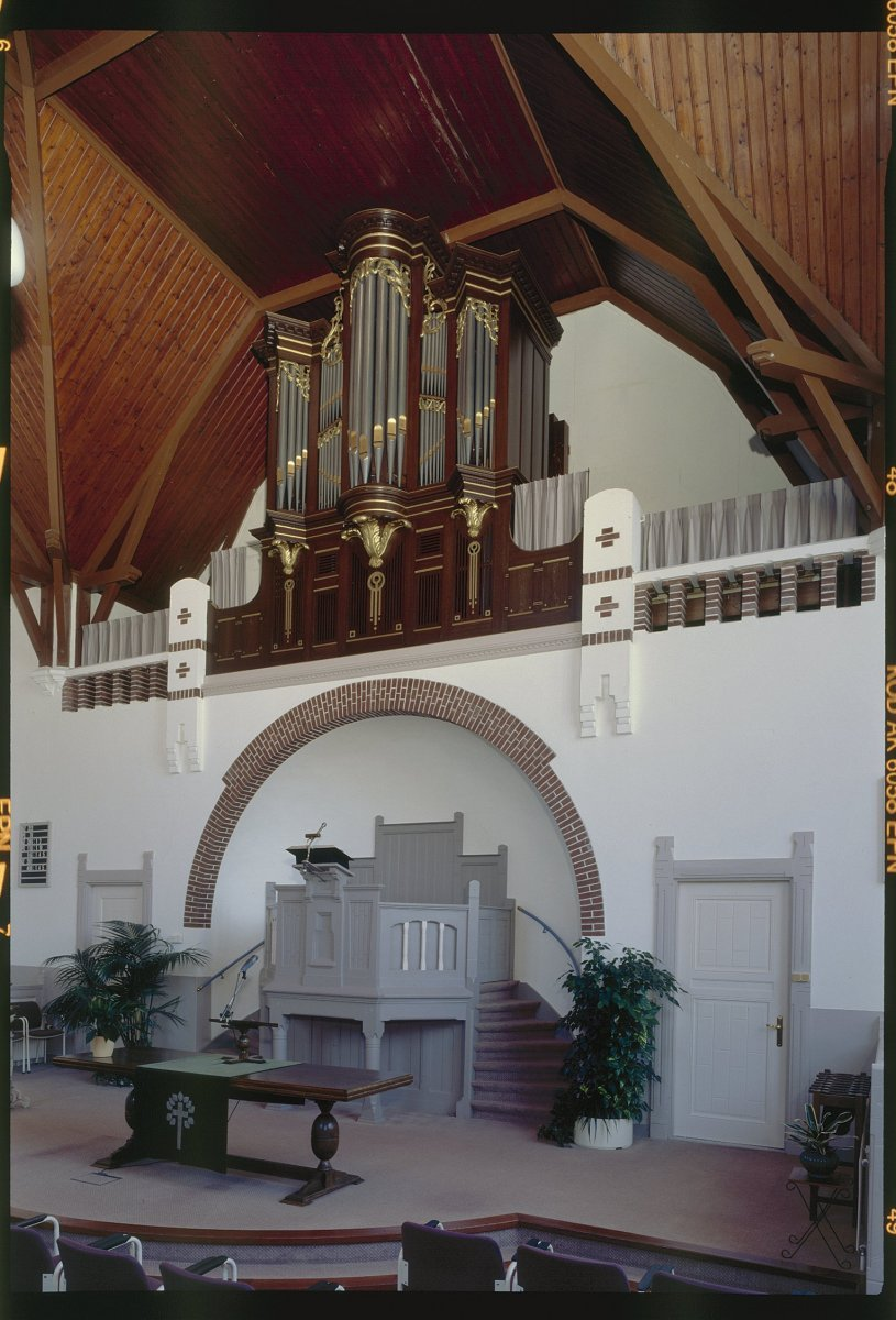 Stadslaankerk, voormalig Gereformeerde kerk: Interieur, aanzicht orgel, orgelnummer 737 (opmerking: Gefotografeerd voor Het Historische Orgel in Nederland 1819-1840, bladzijde 336)